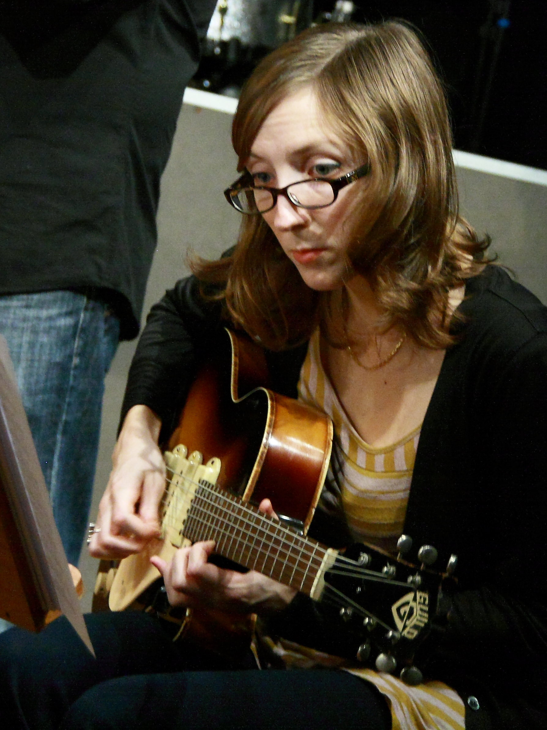 Mary Halvorson mit dem Ingrid Laubrock Octet im Kult, Niederstetten.